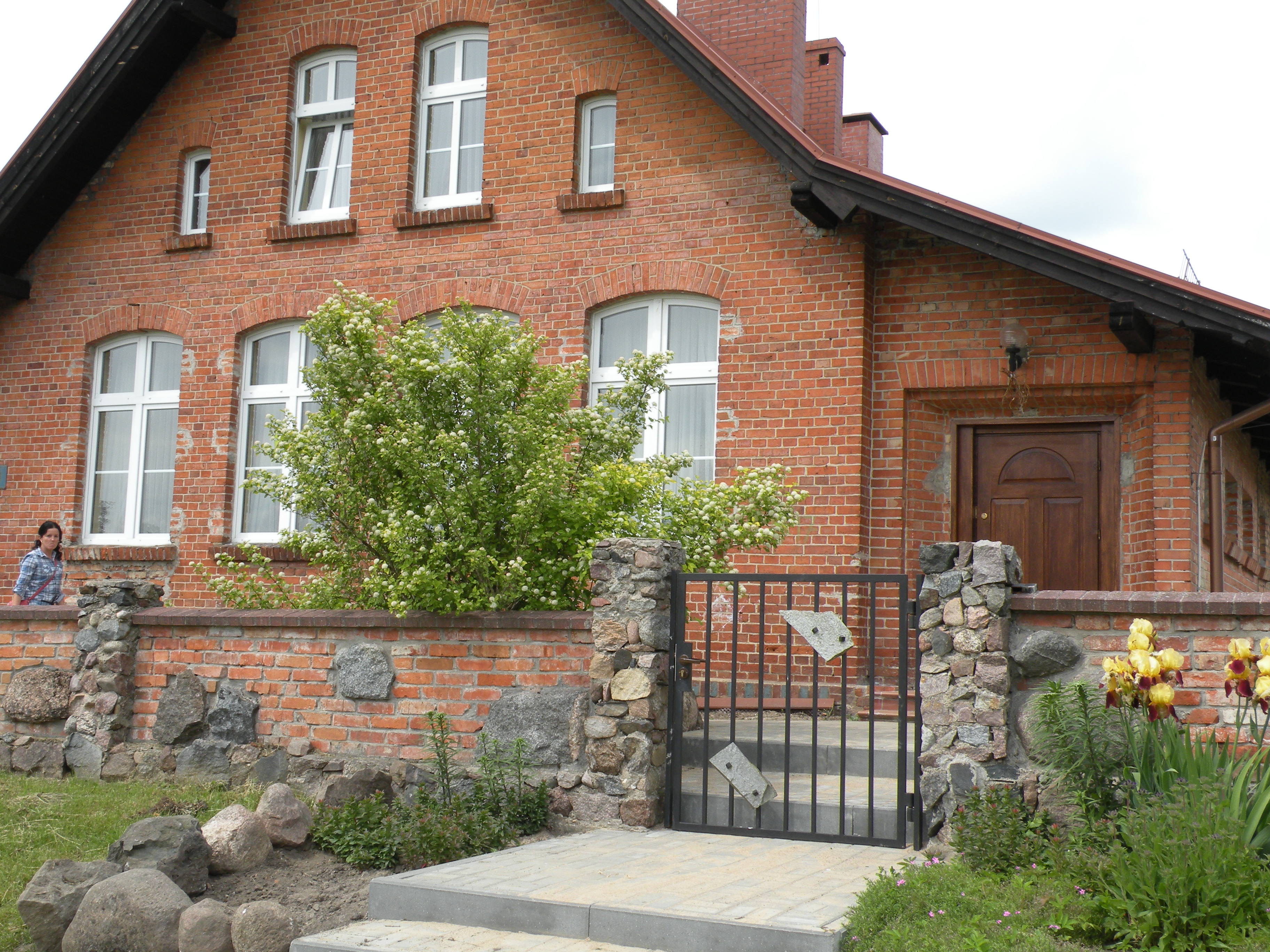 Bałdy